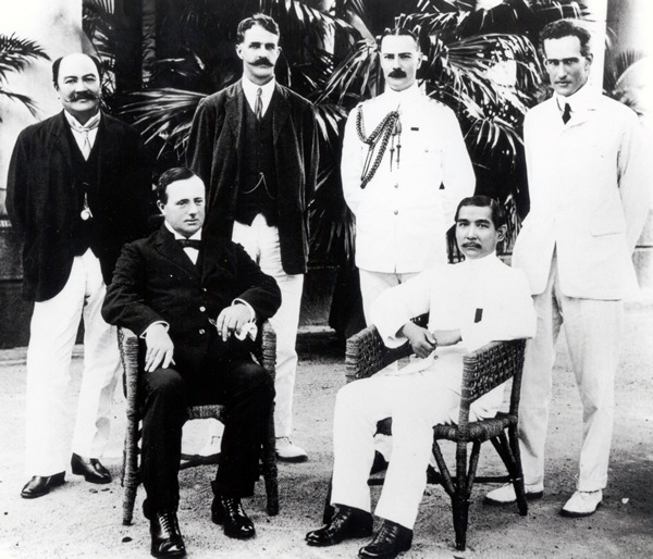 The image here is claimed to be in public domain as it is: There are no copyleft alternatives of such a photo; The image used is of a ceremonial and not a commerical value; The article is greatly improved by the prominence of this photo; Which is hosted and displayed on the not-for-profit Wikipedia Encylopedia for educational purposes. { }